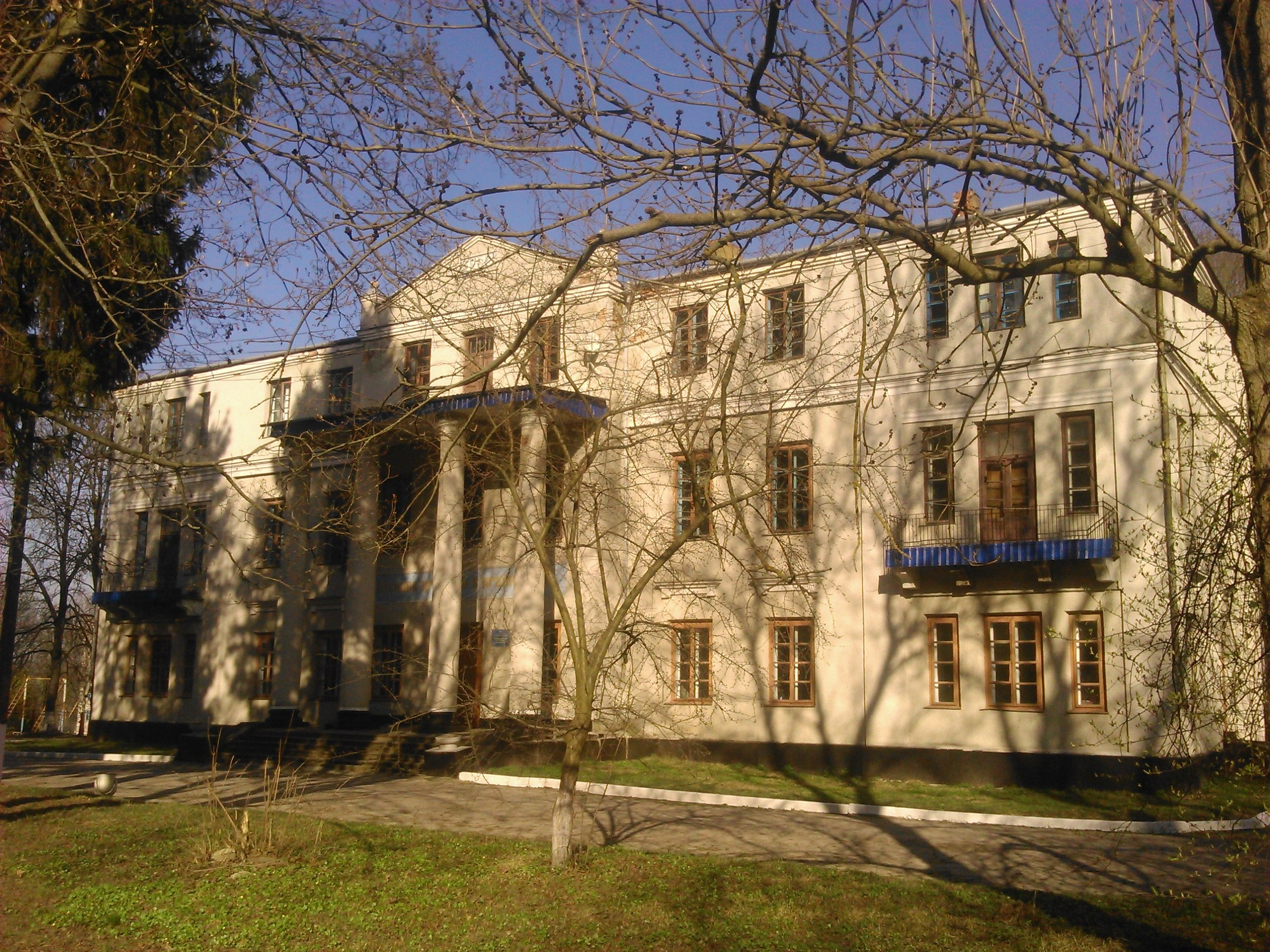 Палацо-парковий комплекс садиби Собанських, Михайлівці, вул. Леніна,9